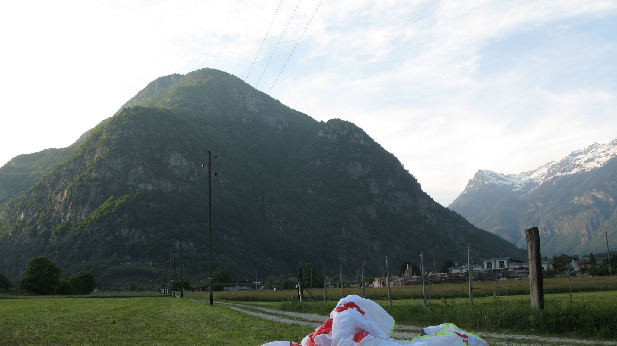 Atterraggio a Iragna